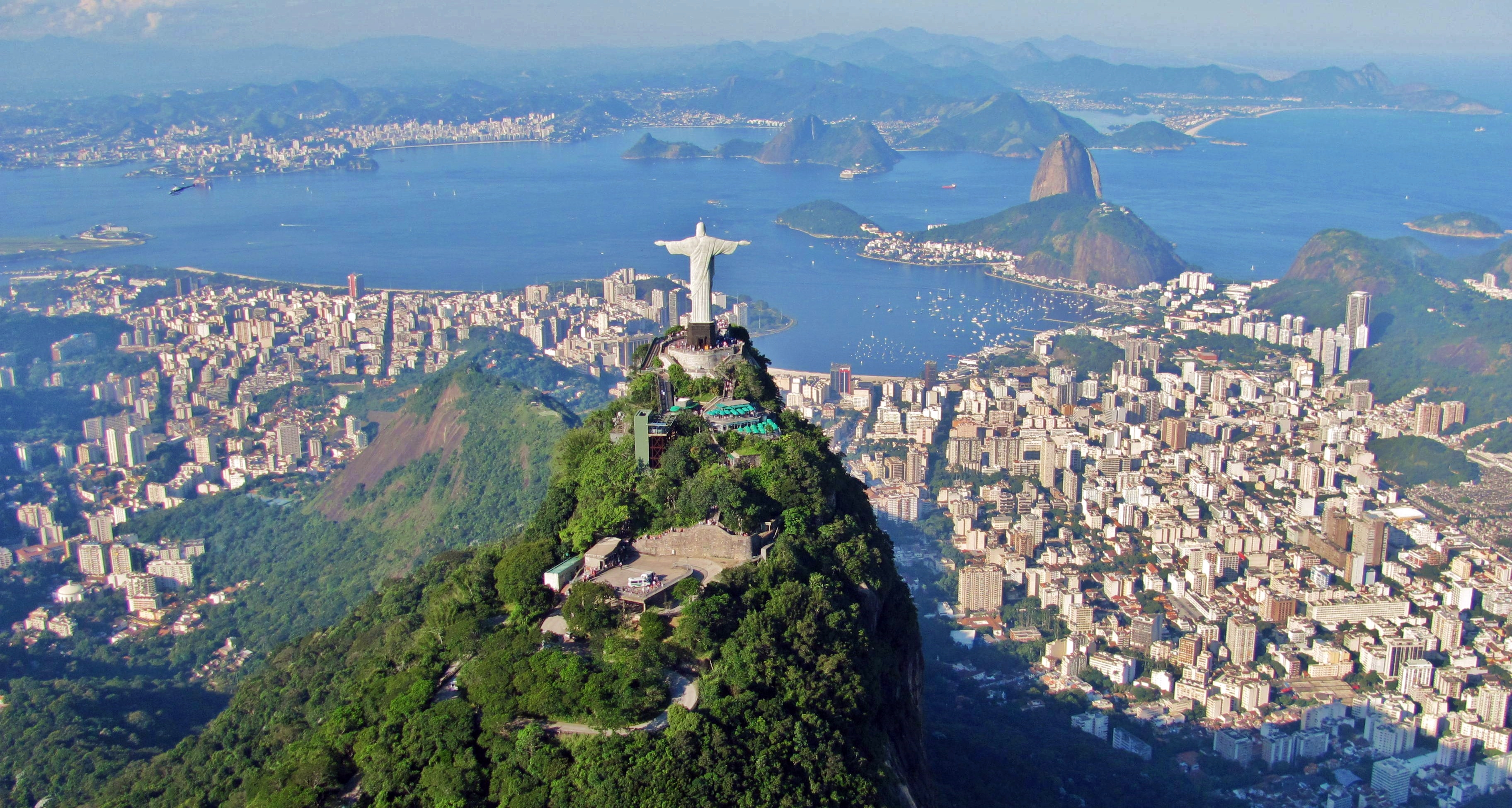 Rio !